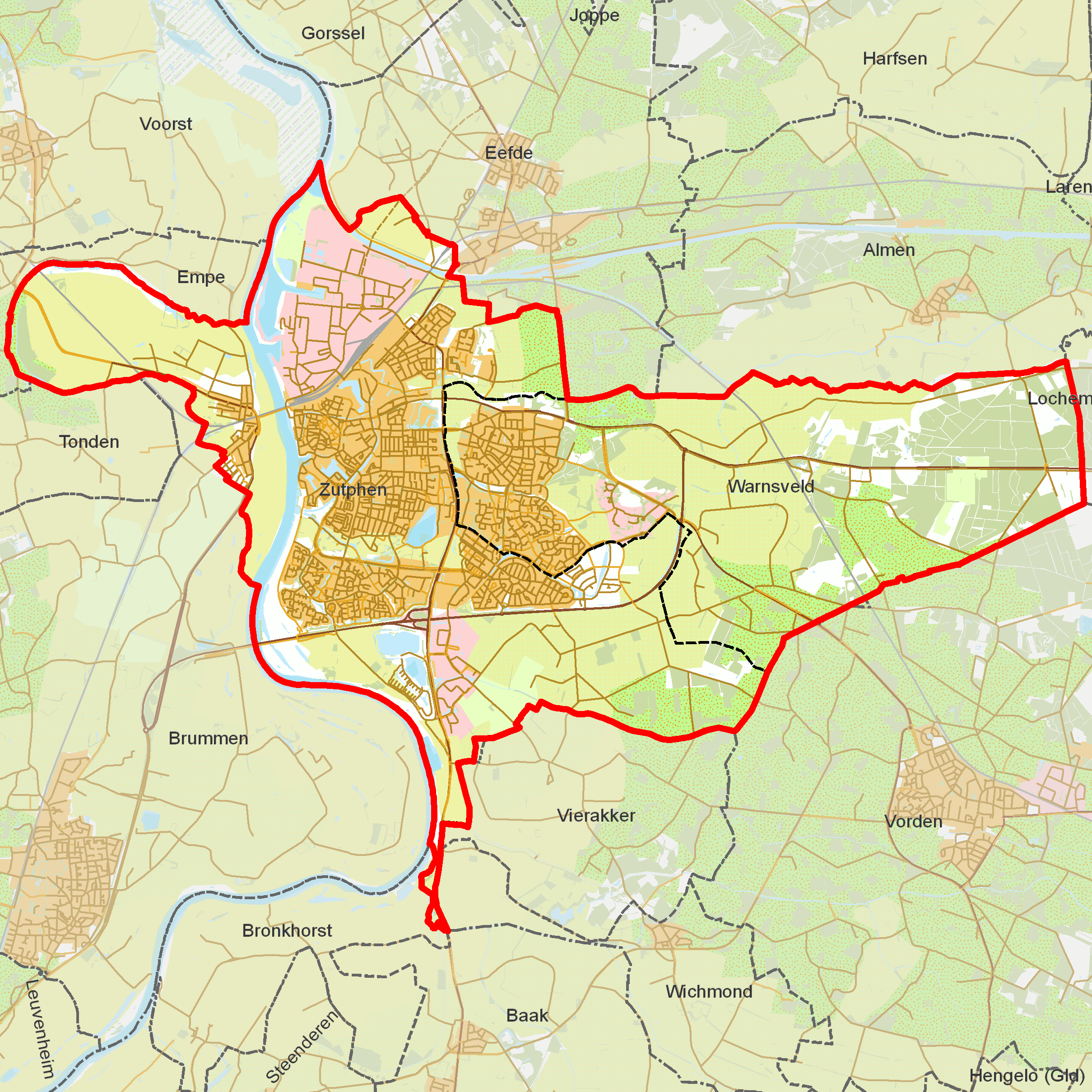 BAG woonplaatsen - Gemeente Zutphen.png